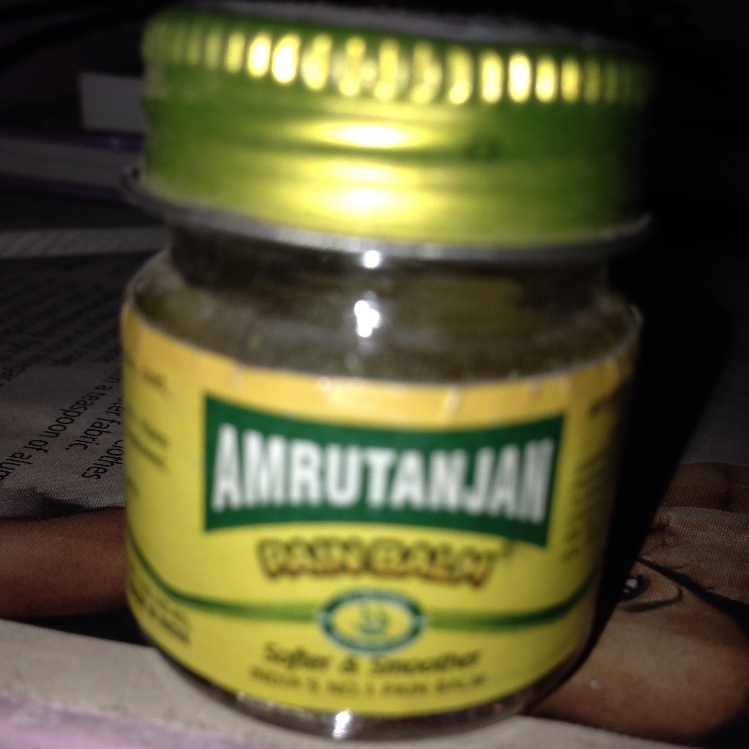 Amrutanjan, a pain relieving balm